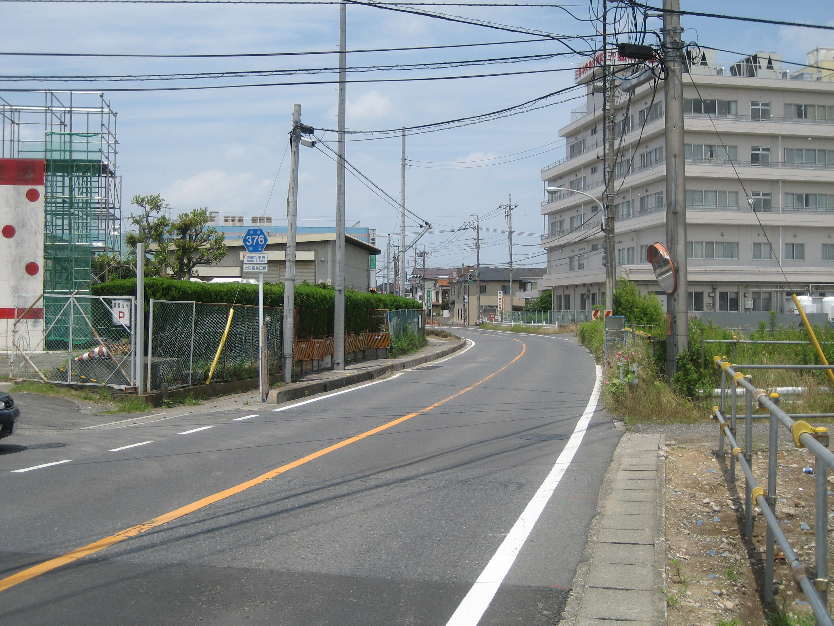 埼玉県道376号線埼玉県三郷市幸房付近